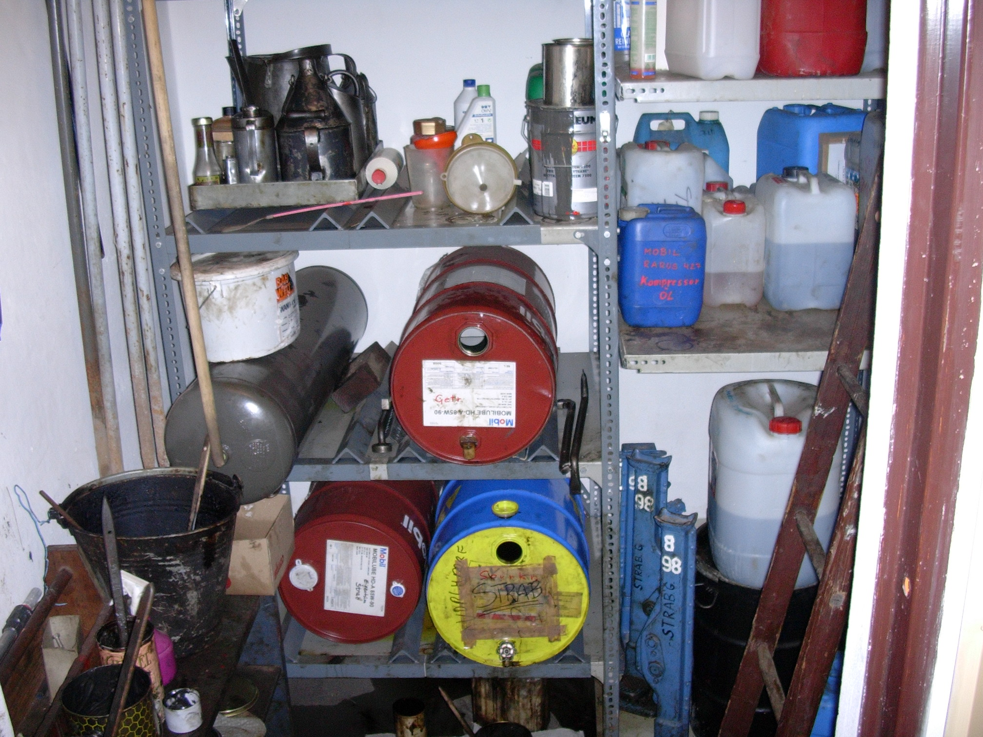 Flüssigkeitenlager